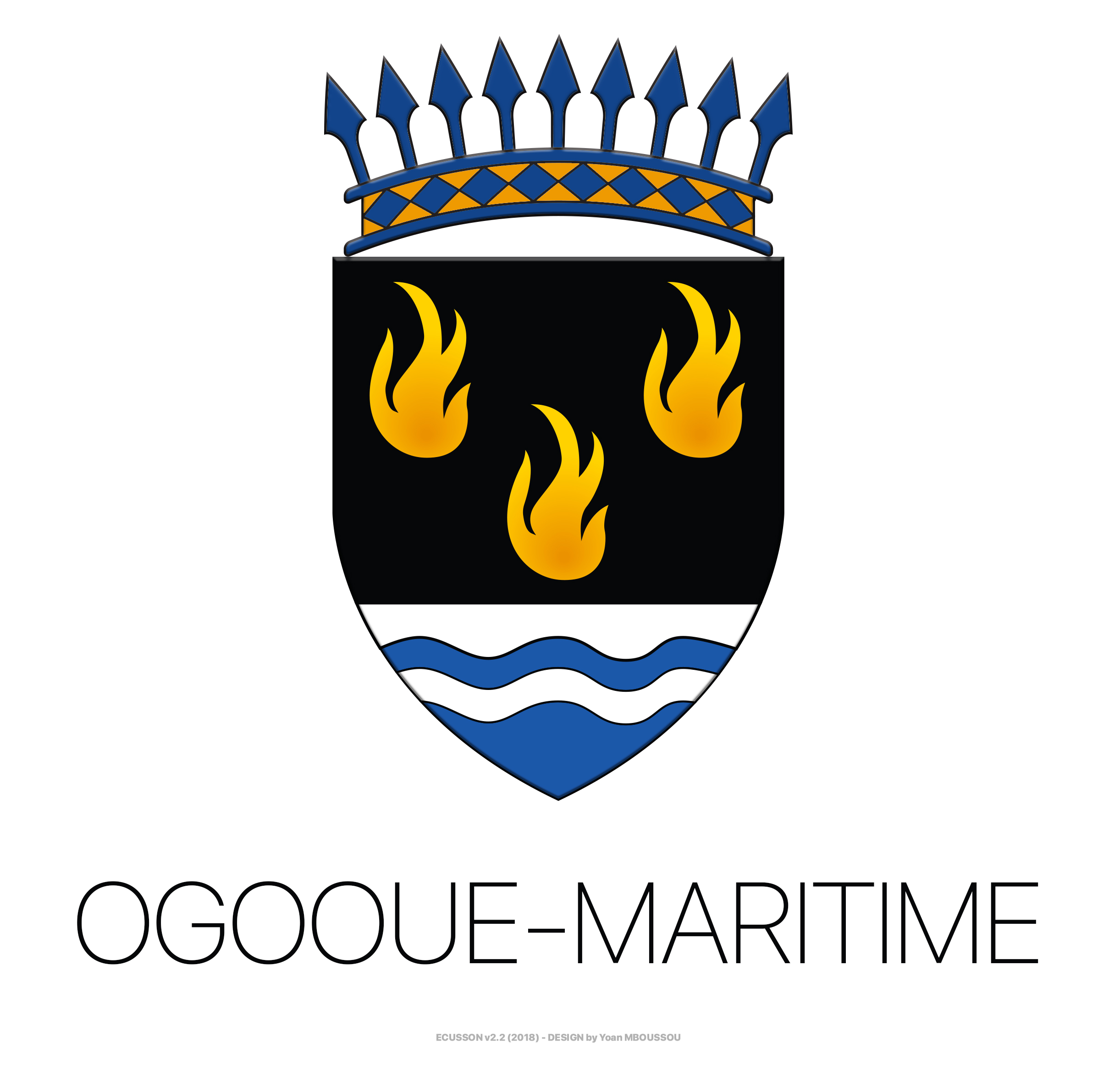 Ecusson de l’Ogooué-Maritime